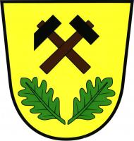 Těně, znak. Ve zlatém štítě černá hornická kladívka s topůrky přirozené barvy nad dvěma odvrácenými vztyčenými zelenými dubovými listy.